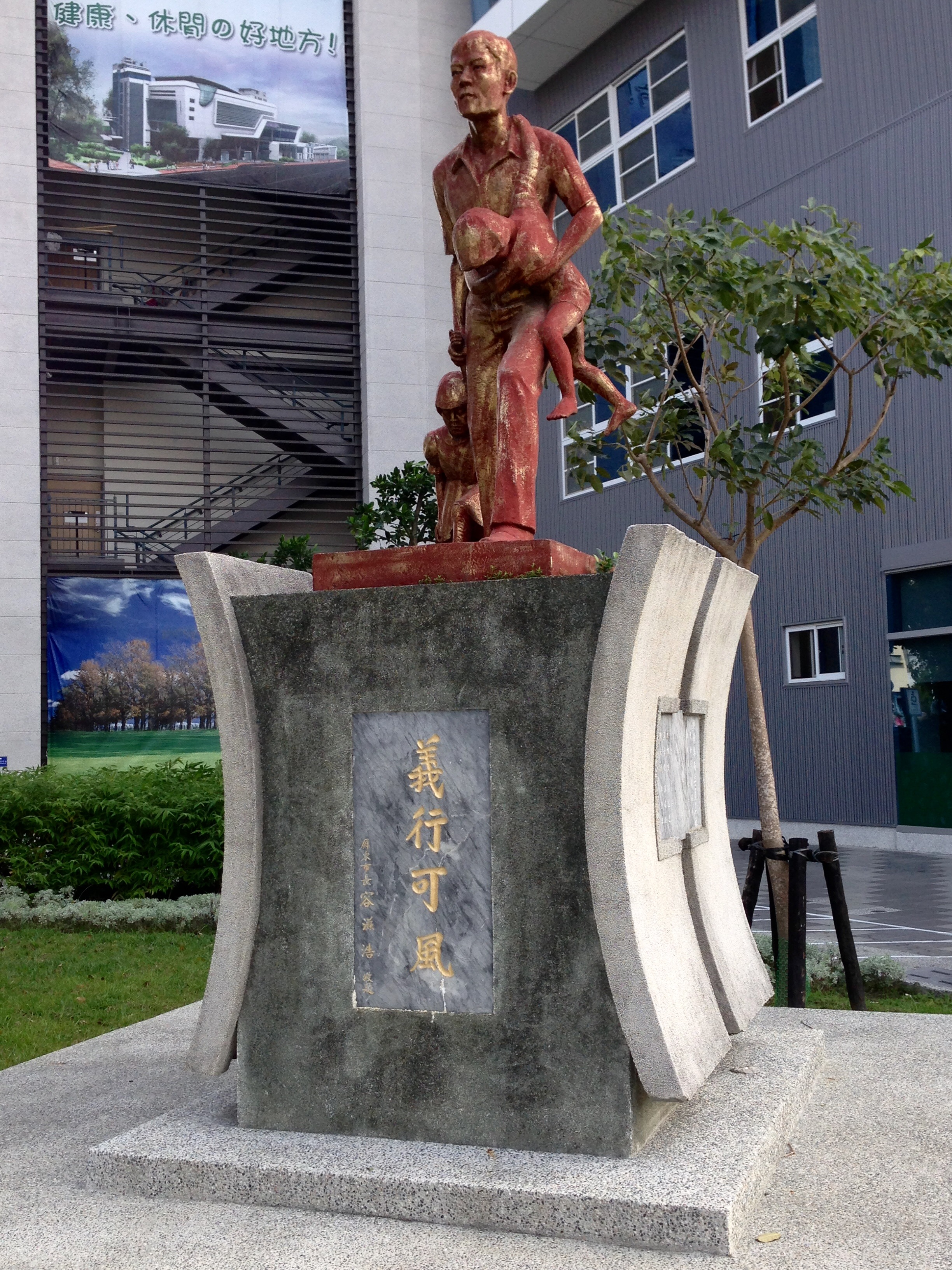 丁清祥銅像與銅像座